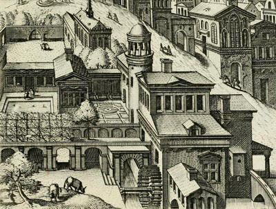 гравюра Ганс Вредеман Садок на рівні другого поверха 1601